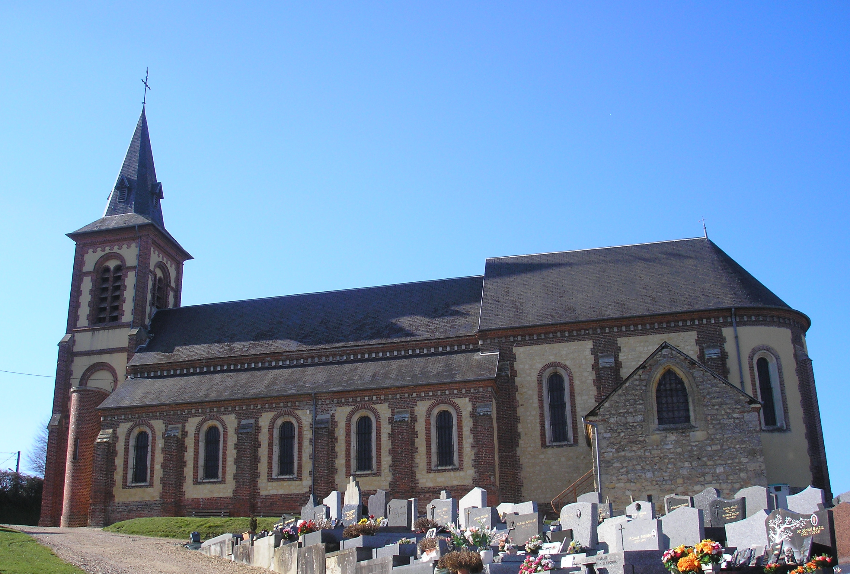 Beuvillers (Normandie, France). L'église Sainte-Cécile.